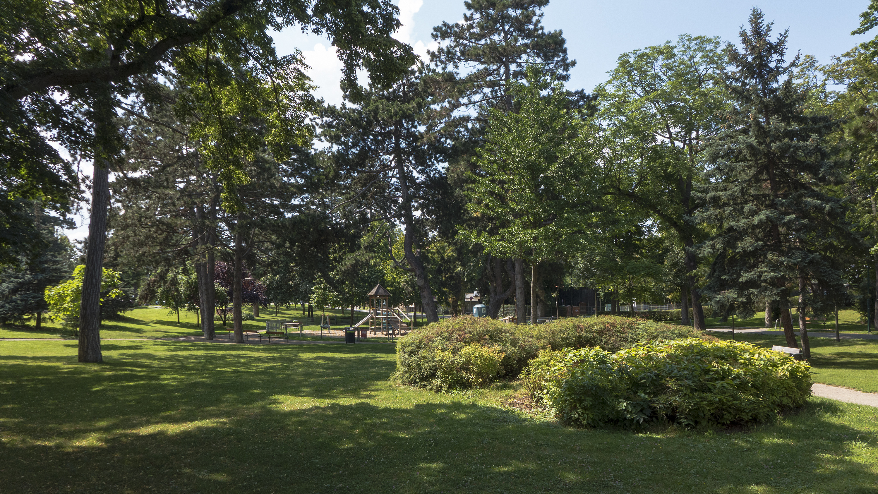 Astrid-Lindgren-Park in Wien 22